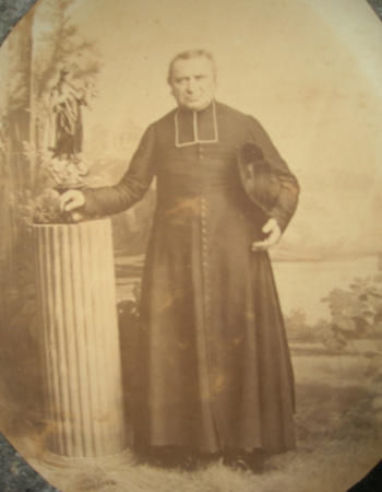 Photograhie non datée du Père Cestac